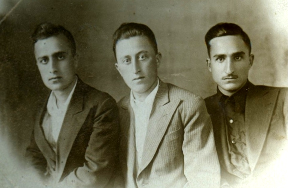 1941 წლის ანტისაბჭოთა აჯანყების ორგანიზატორები: გიორგი ძიგვაშვილი, შალვა შავიანიძე, კოტე ჯოგლიძე